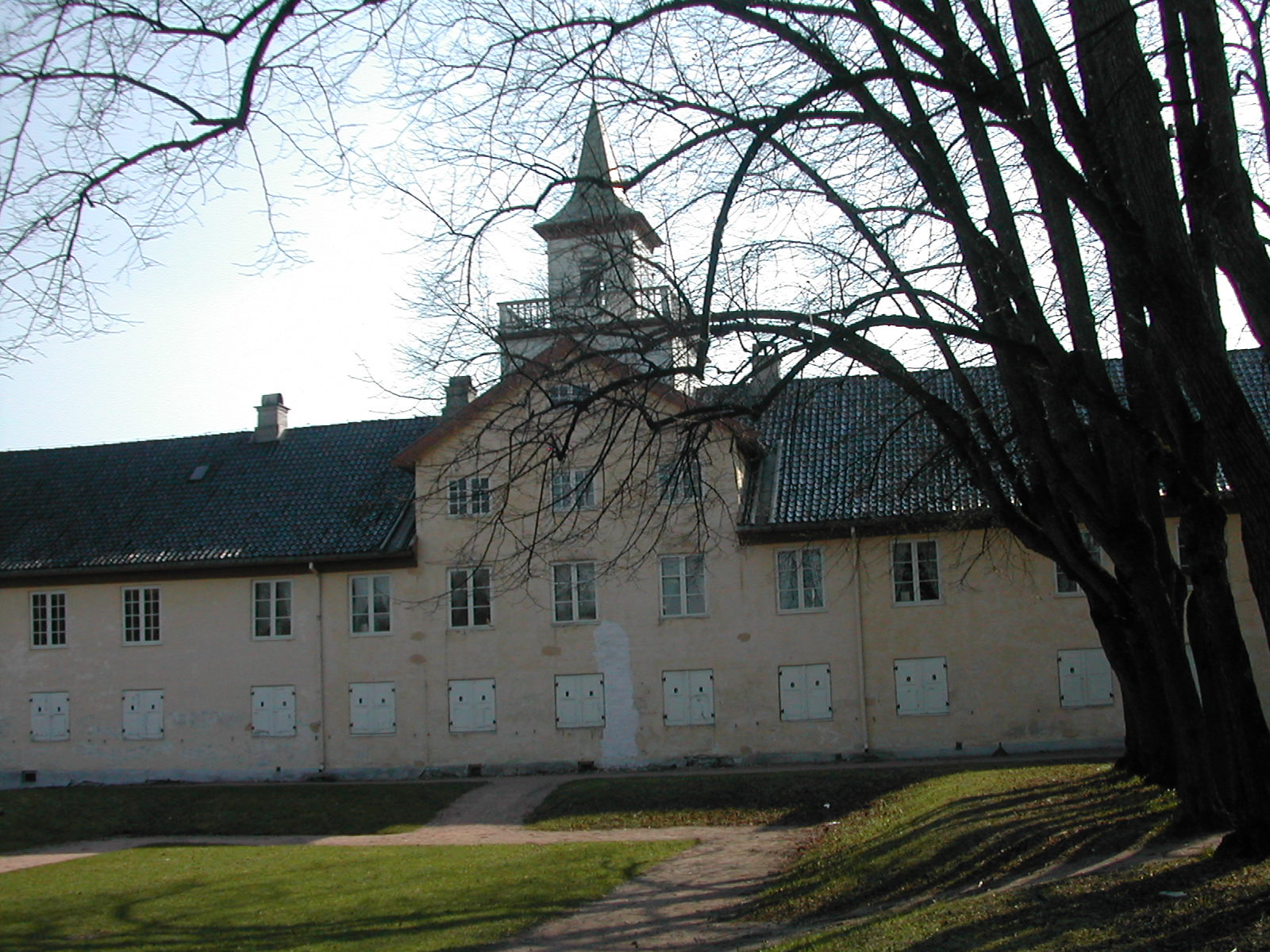 Frogner Manor in Oslo